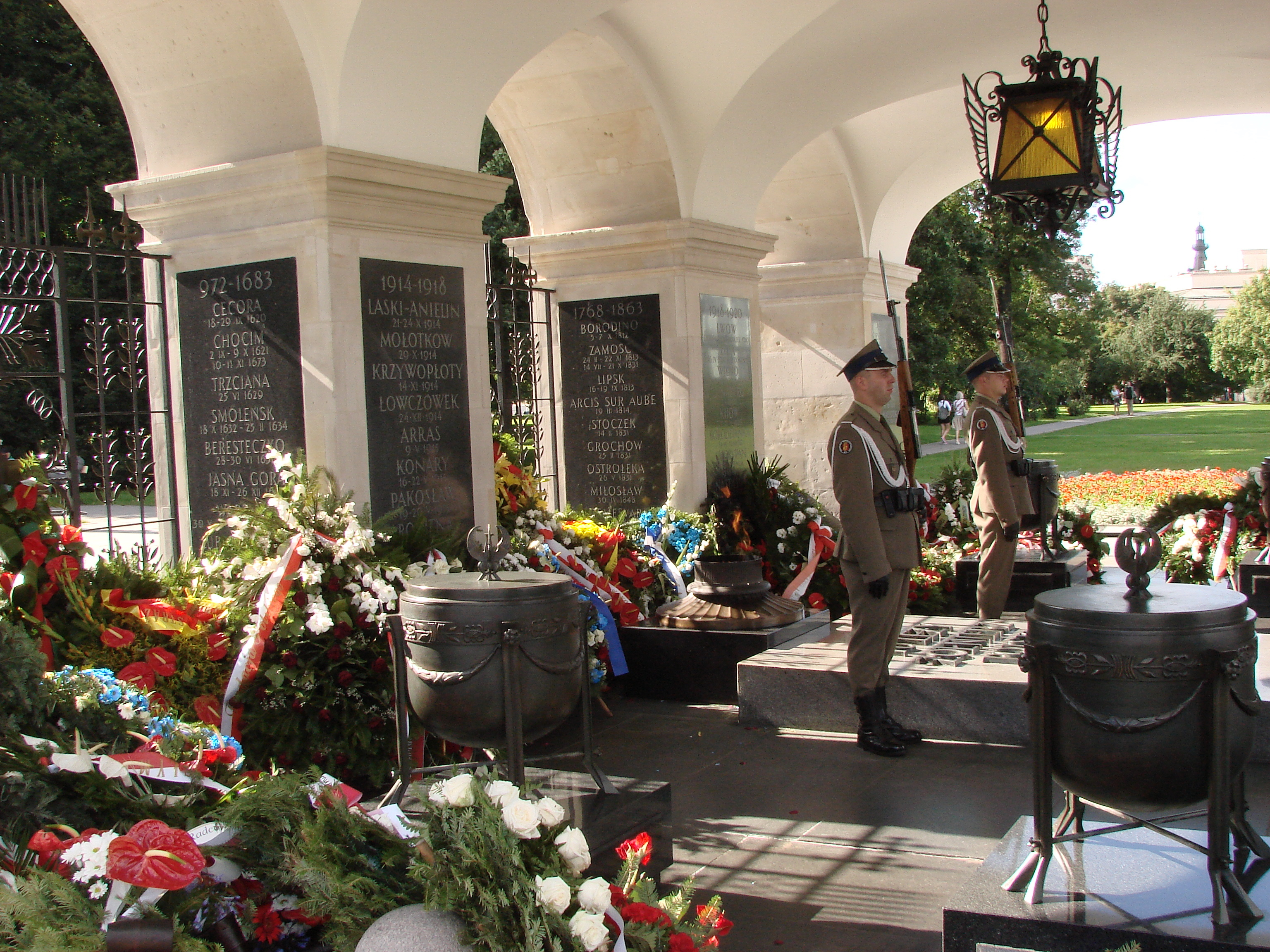 grób-pomnik na placu marszałka Józefa Piłsudskiego w Warszawie.